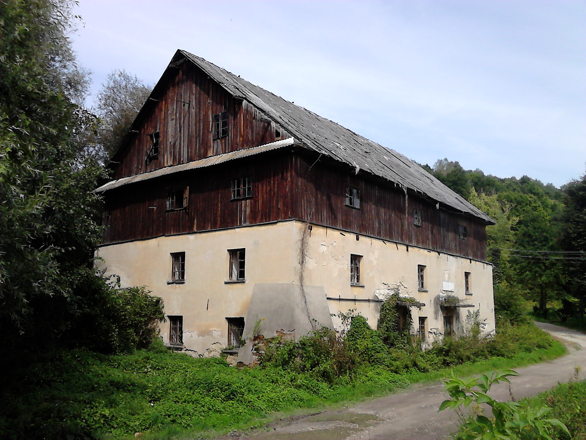 Młyn wodny z XIX wieku